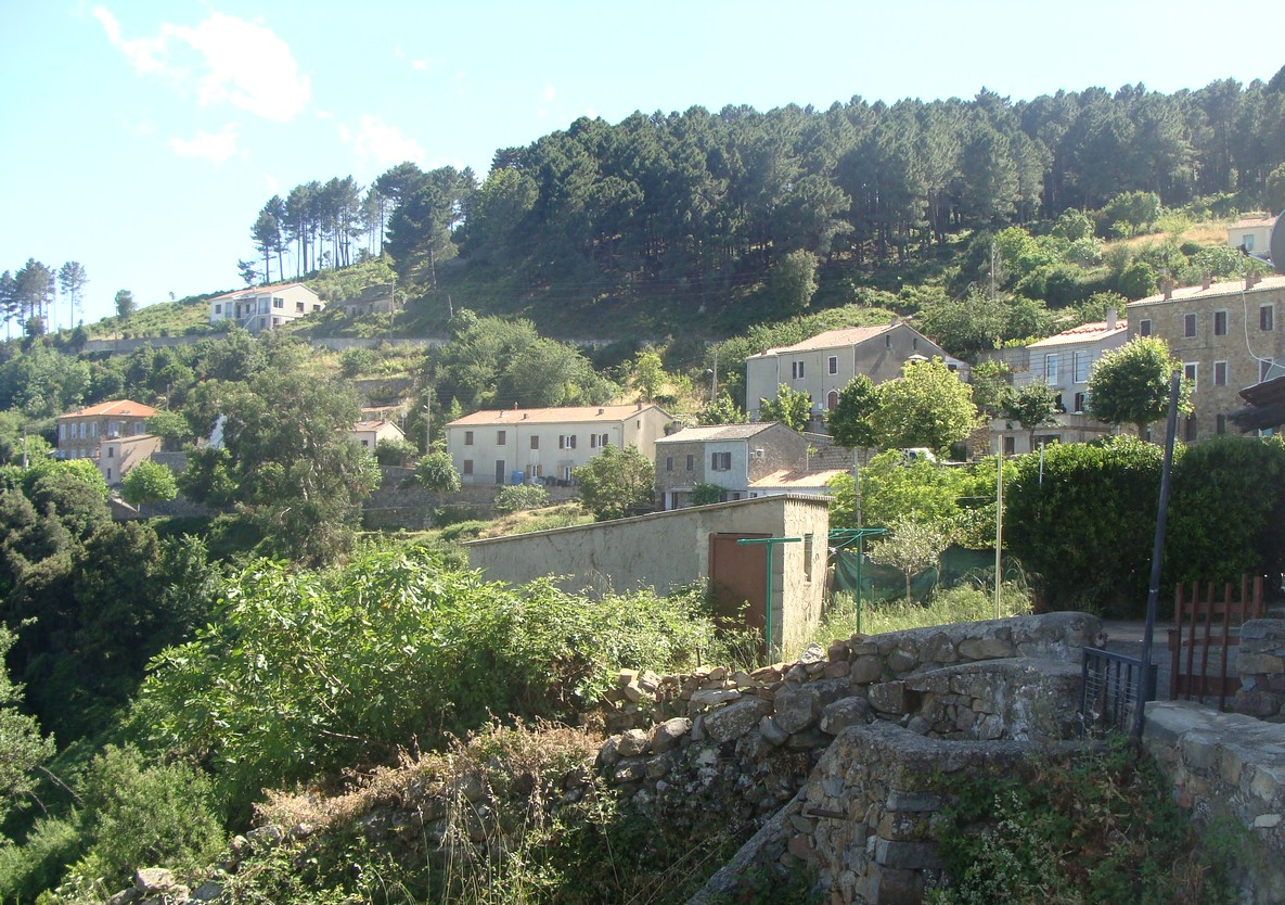 Vue du village de Solaro (Haute-Corse).